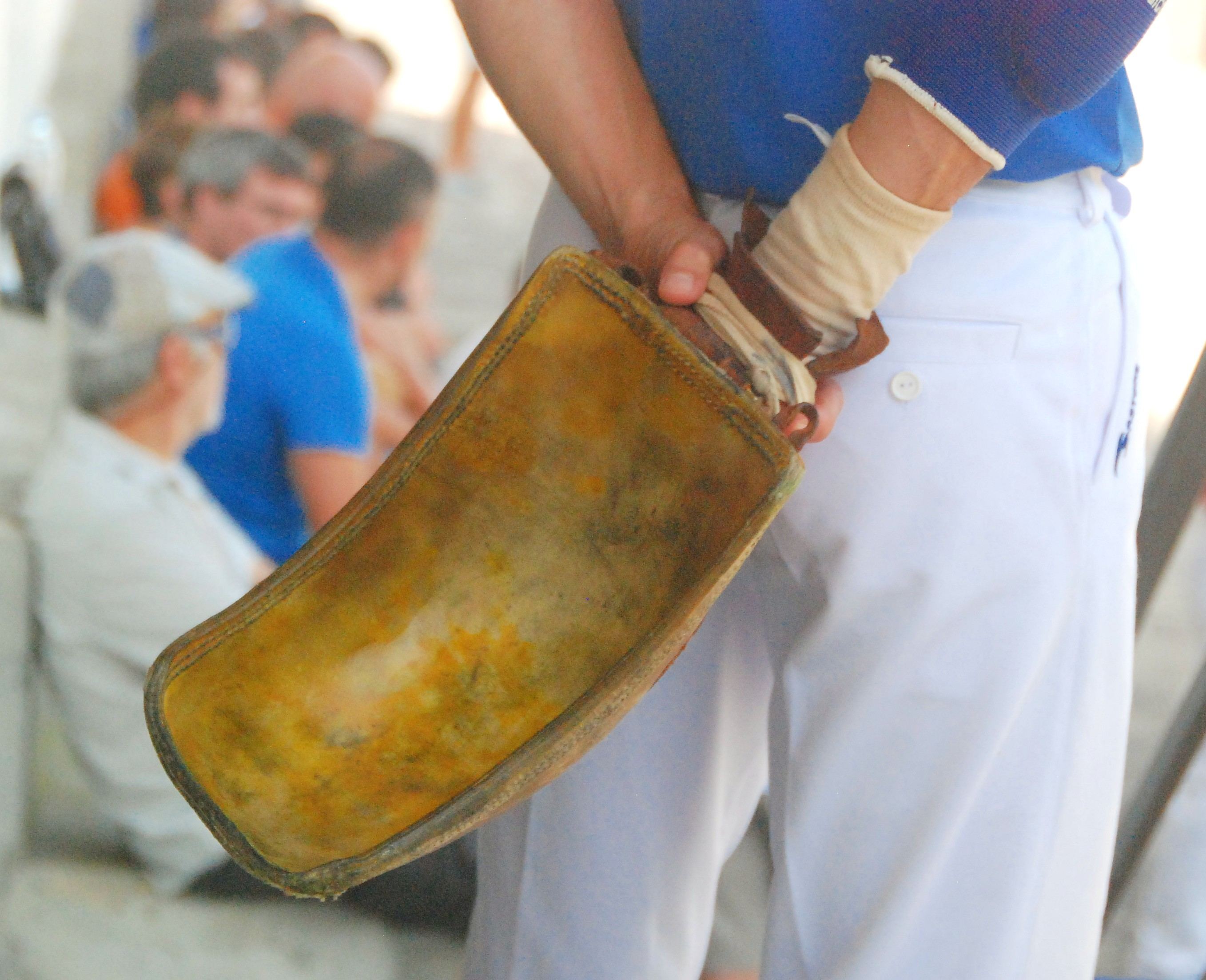 Laxo pilota-jokoa Malerrekako Oitz herrian 2018ko finala.